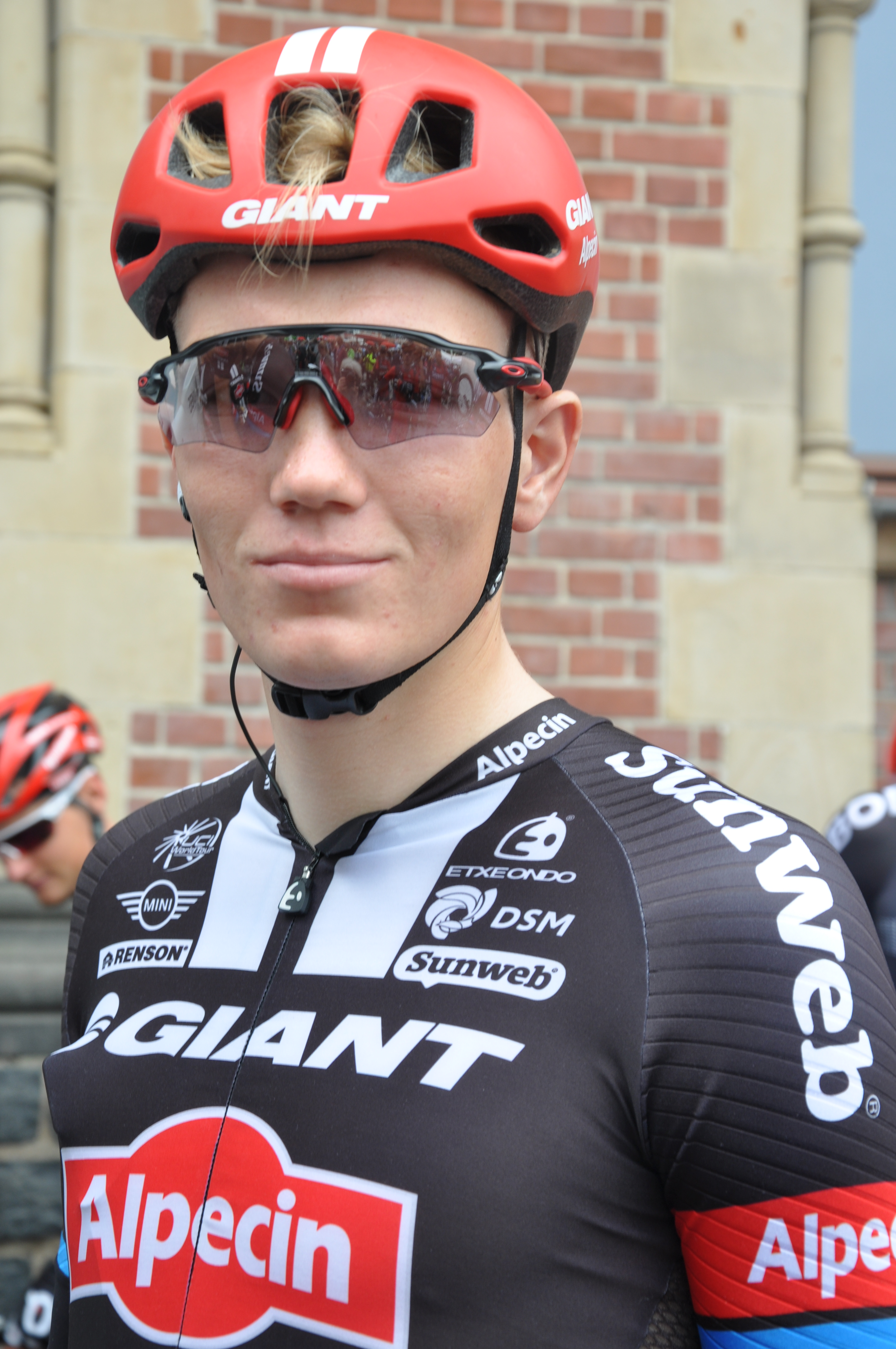 Sören Kragh Andersen, dänischer Radrennfahrer